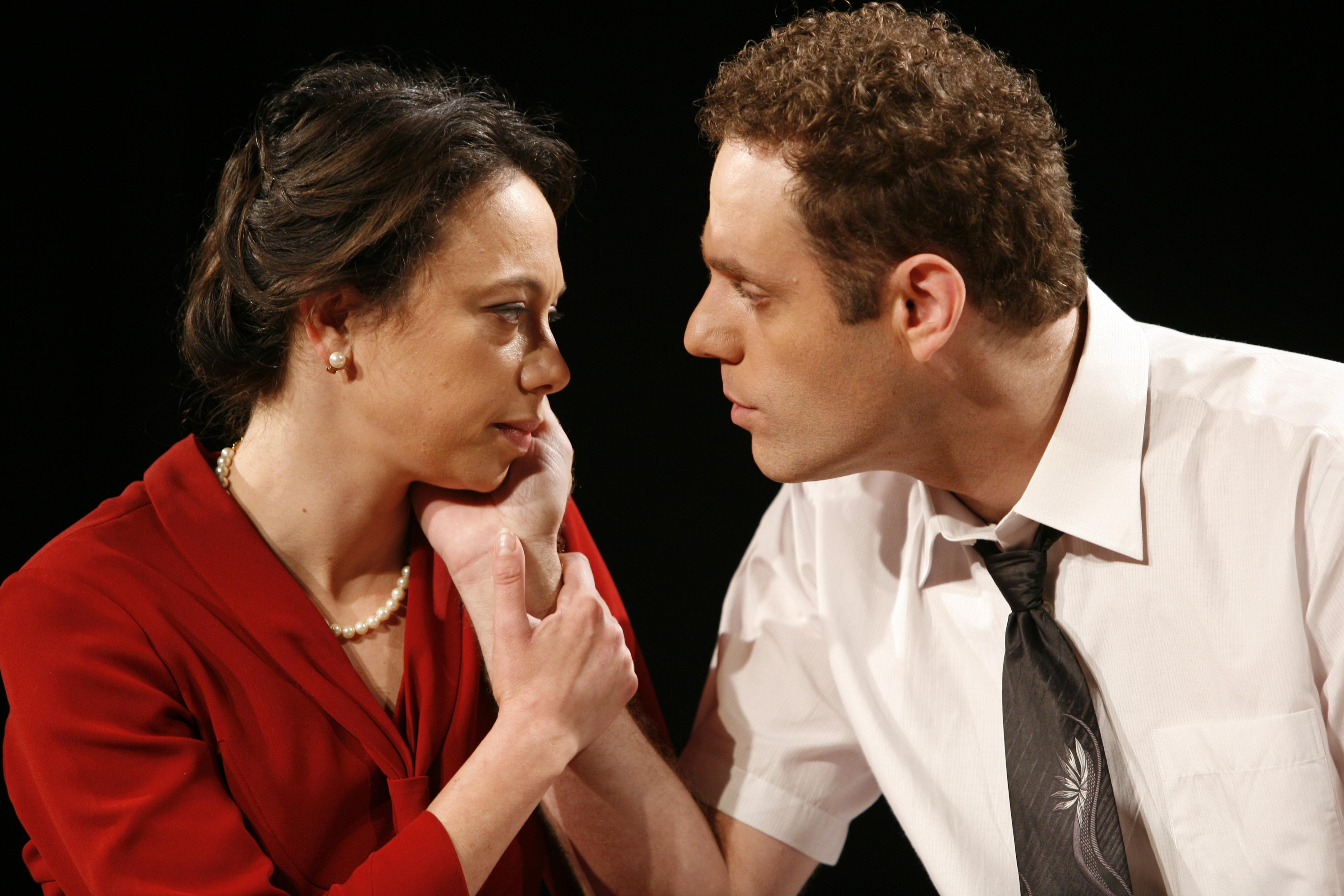 קרן צור ומיכה סלקטר בהצגה אנדה